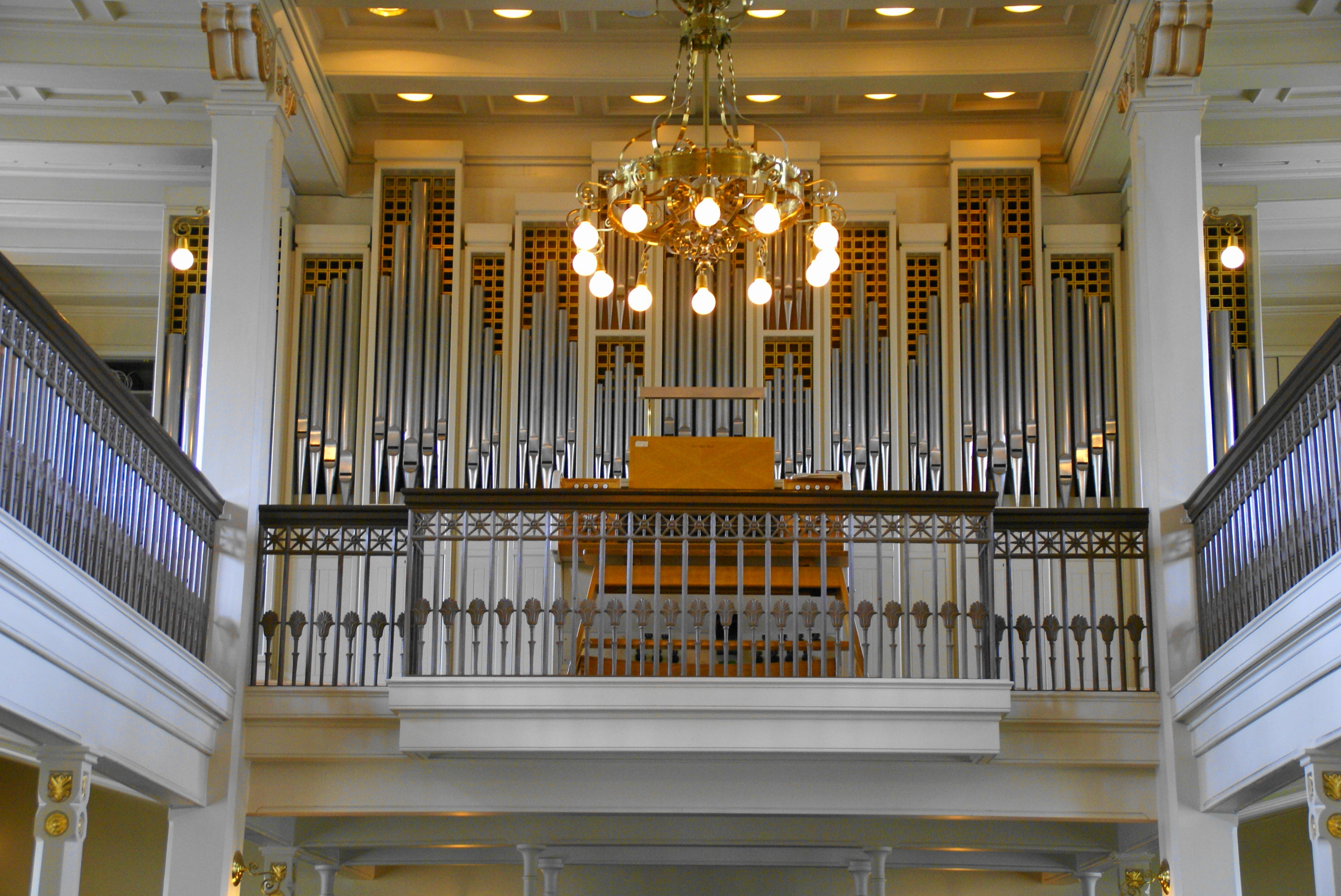 Domkirche Reykjavik